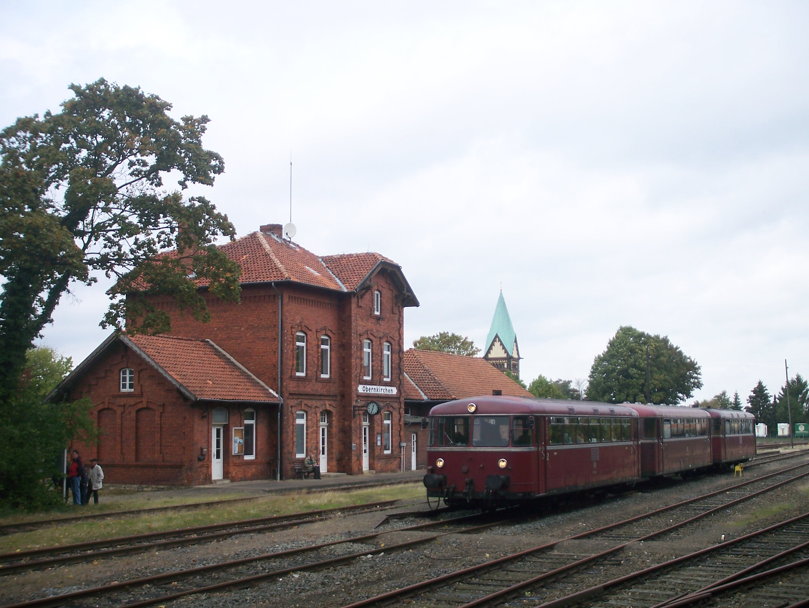 Schienenbus Sonderfahrt im Bahnhof Obernkirchen (RStE)